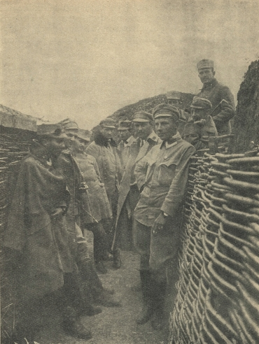 Oficerowie I batalionu 2 pułku piechoty (II Brygada Legonów Polskich) w okopach w czasie walk w Besarabii